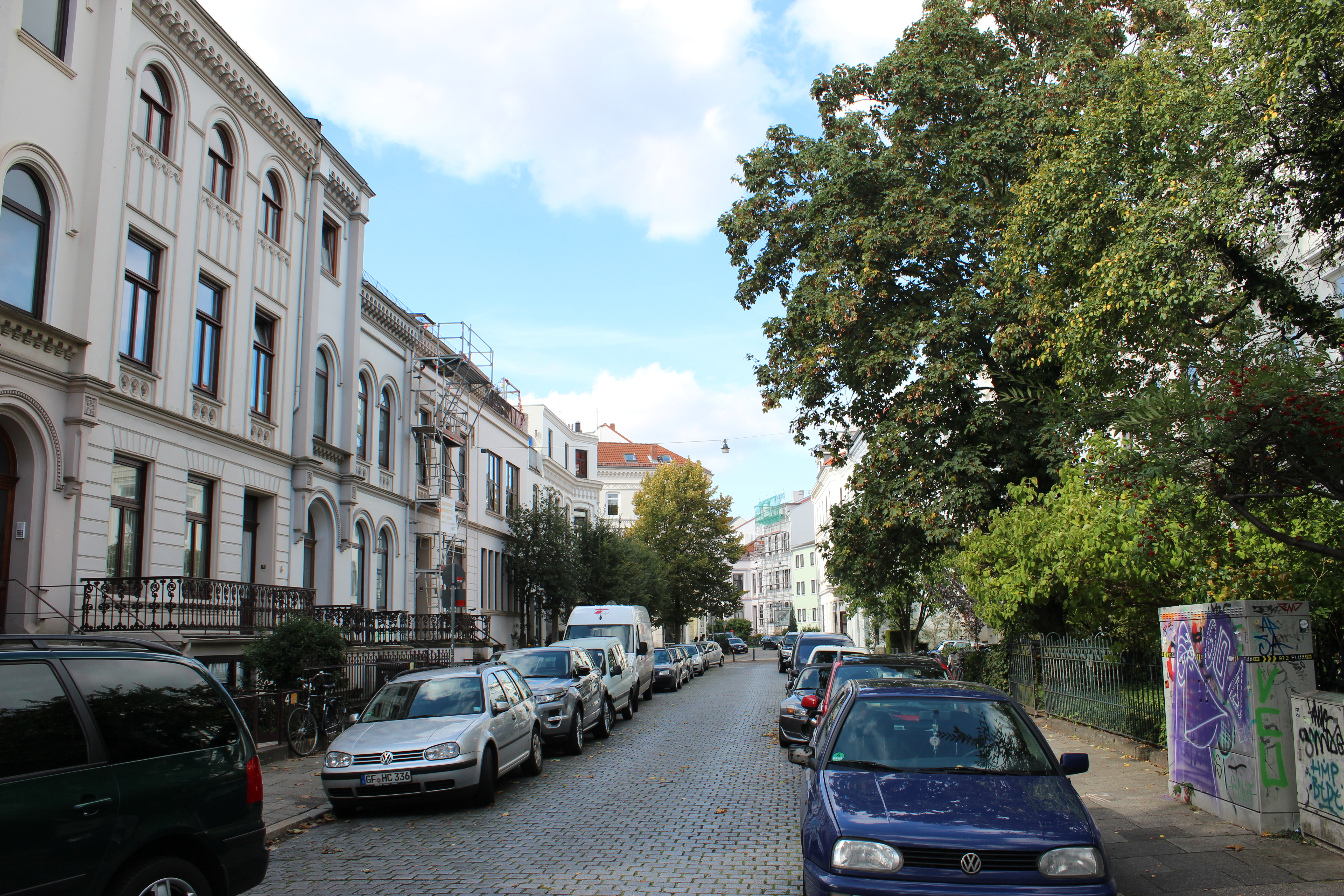 Ensemble Beim Steinernen Kreuz, Vasmerkreuz in Bremen, Beim Steinernen KreuzDie Denkmalgruppe ist ein geschütztes Kulturdenkmal in der Freien Hansestadt Bremen, mit der Nr. 1225 beim Landesamt für Denkmalpflege registriert.